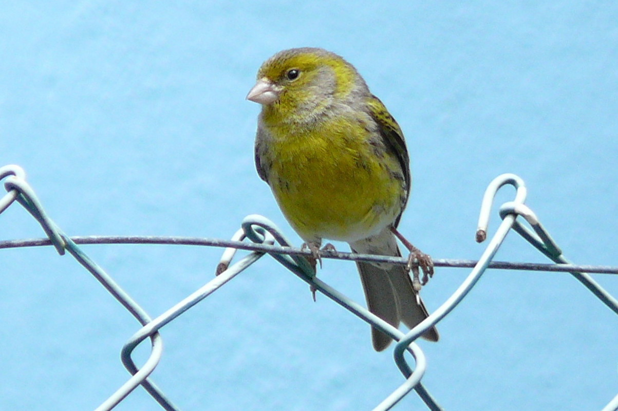 Kanarienvogel (Serinus canaria), Wildform auf La Palma